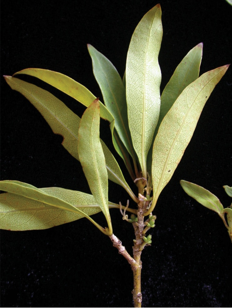 Coprosma fatuhivaensis